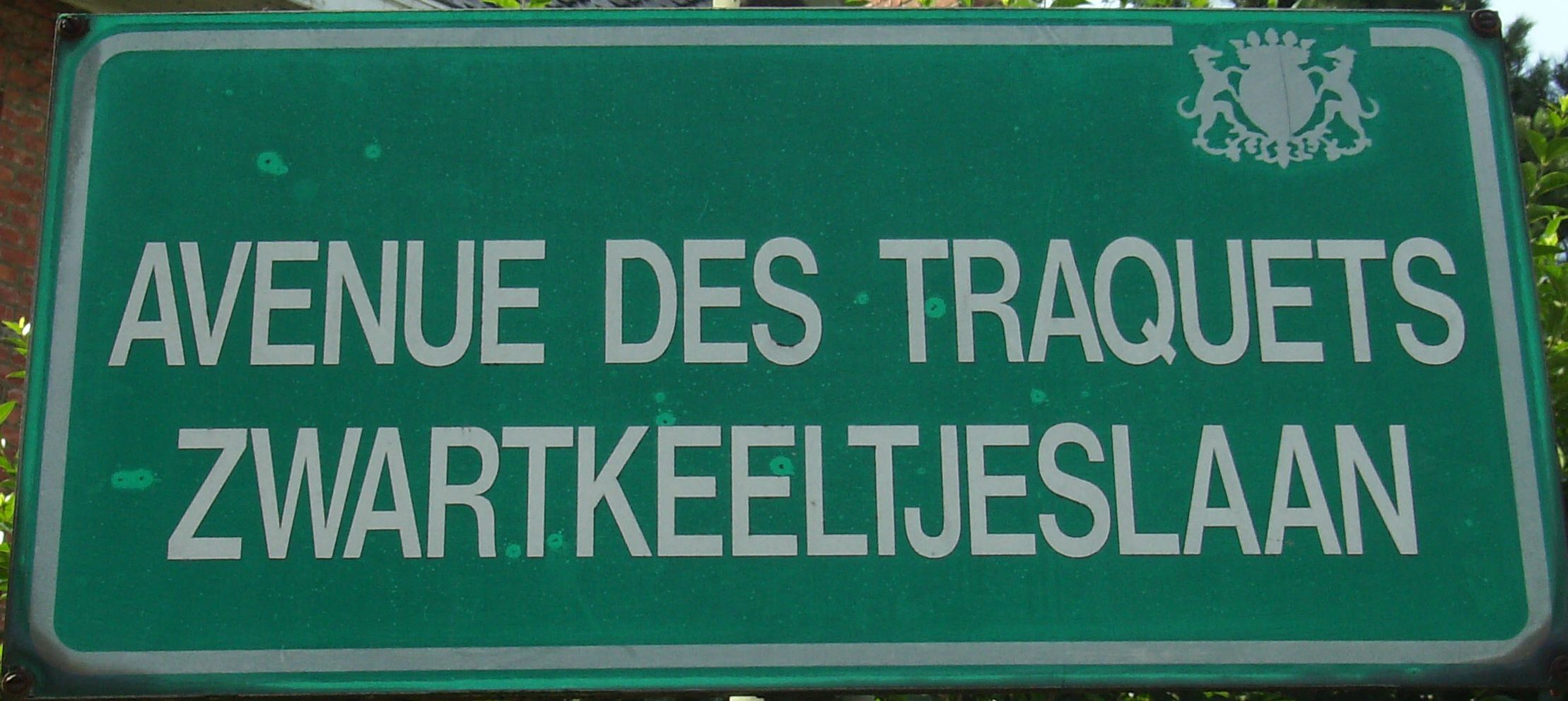 Plaque de rue Woluwe Saint Pierre Belgium